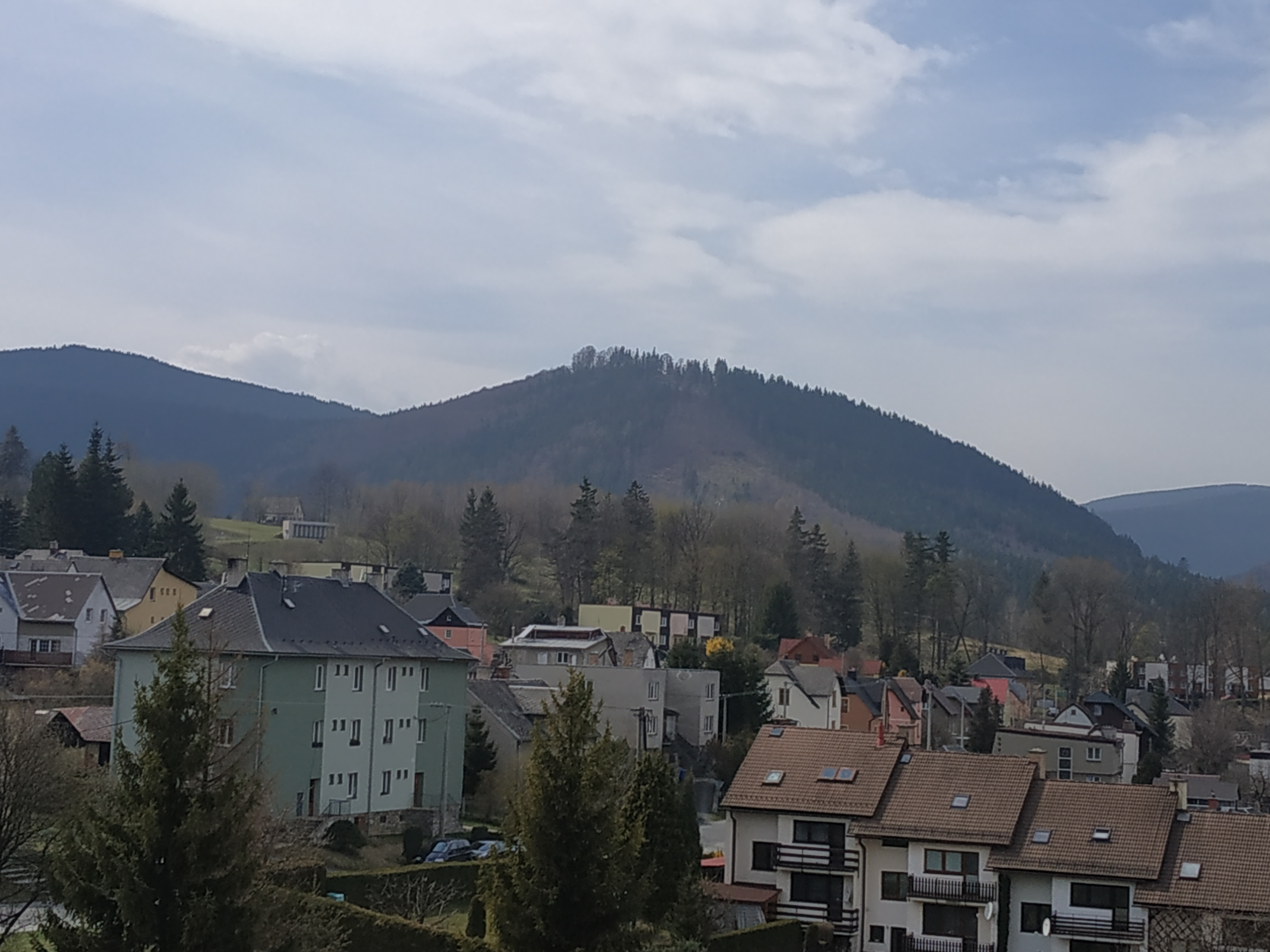 Pohled na Zámeckou horu z Vrbna pod Pradědem.